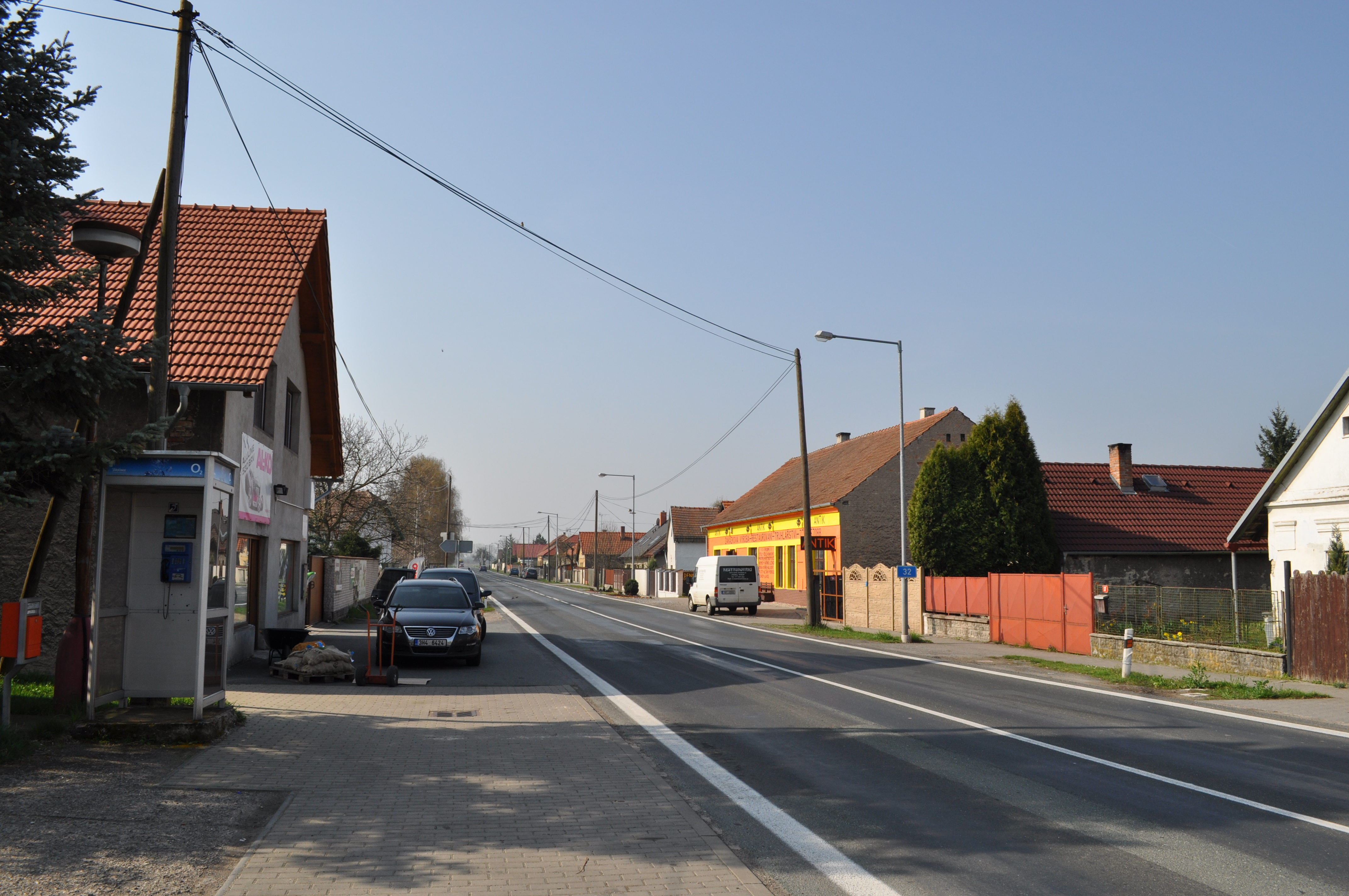 Okřínek